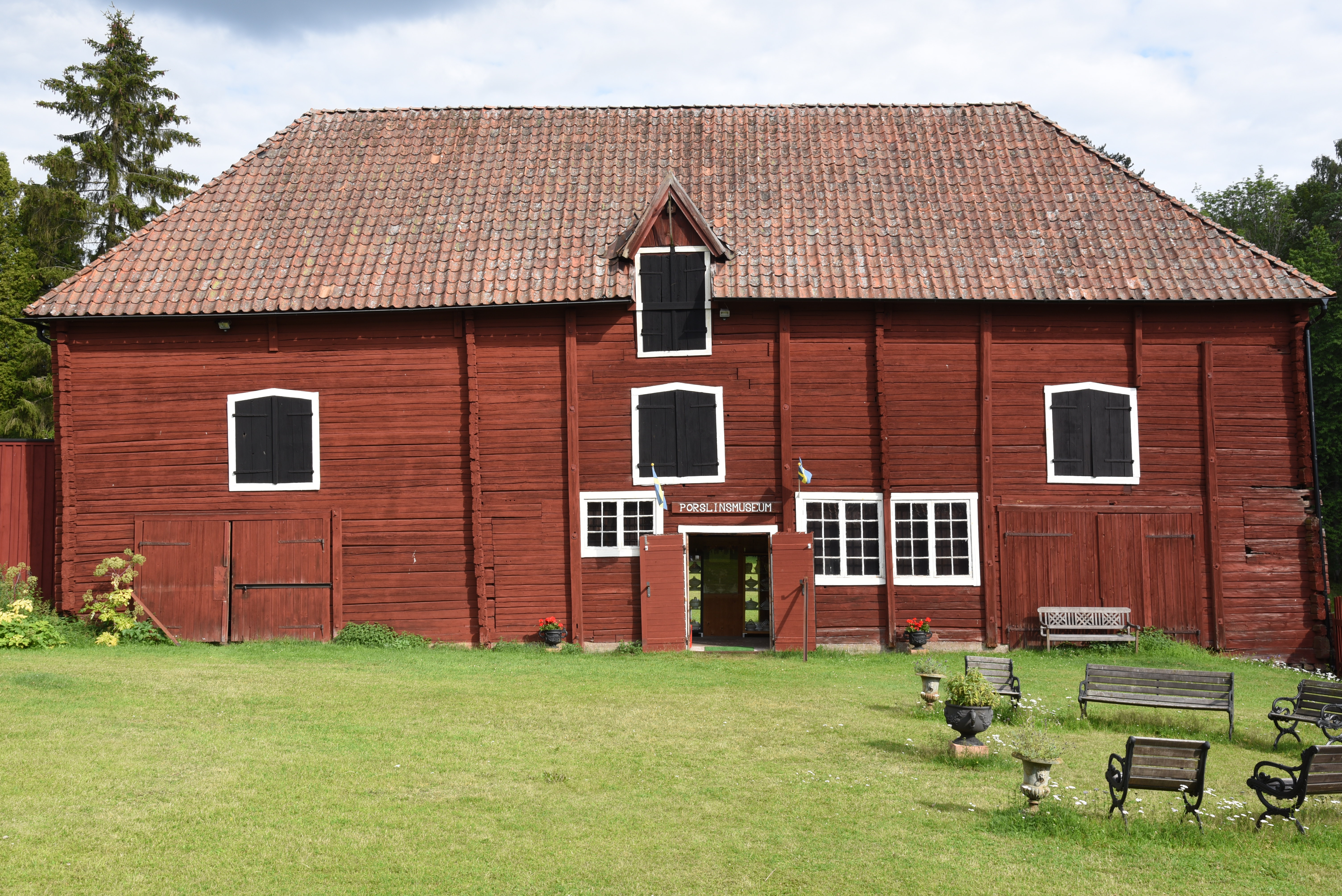 Godegårds bruks- och porslinsmuseum vid Godegårds herrgård. Museet innehåller en av de största samlingarna av svenskt bruksporslin från 1700-talet till nutid.